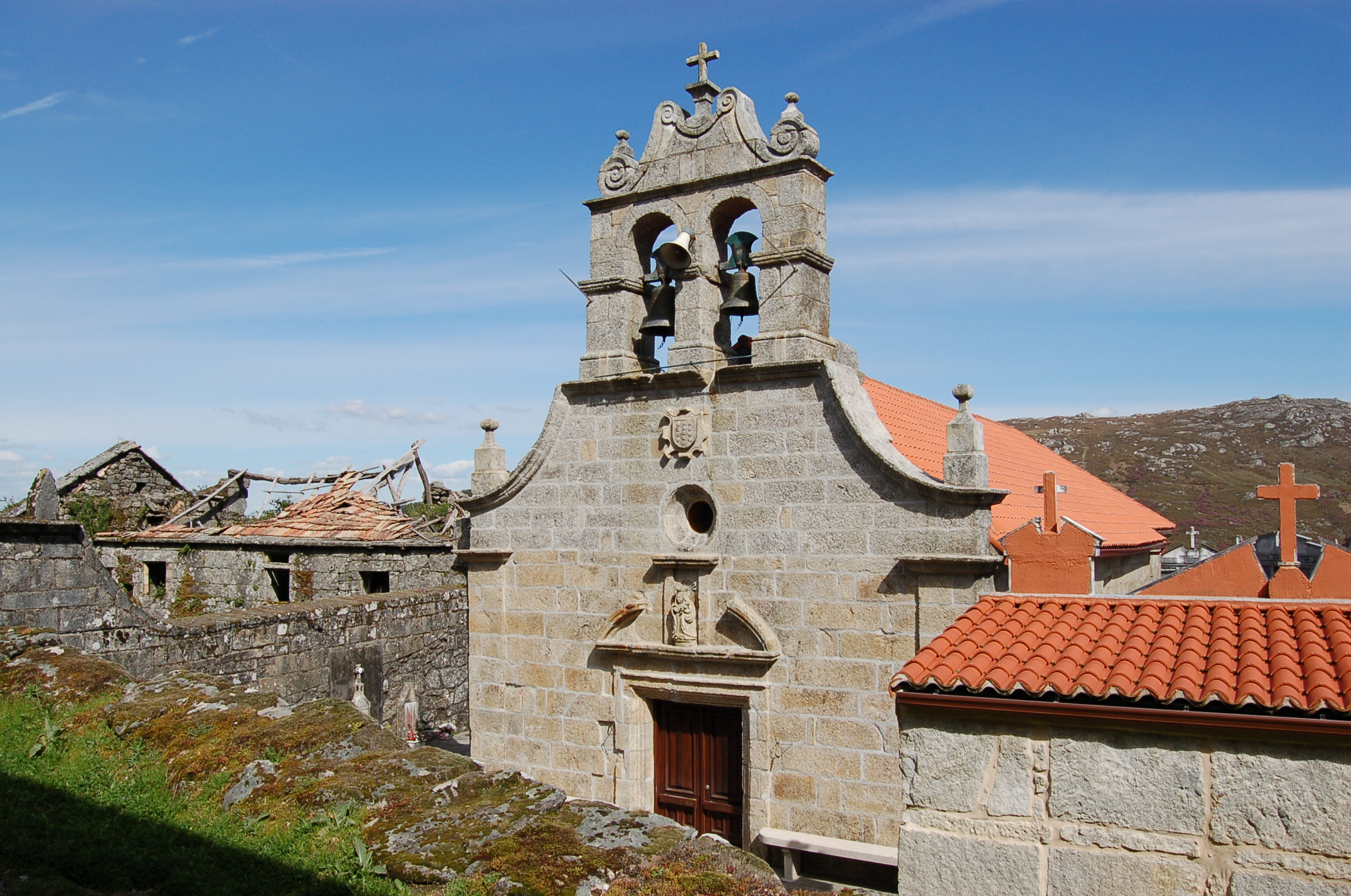 Igrexa parroquial de Santa María de Nieva, no concello de Avión